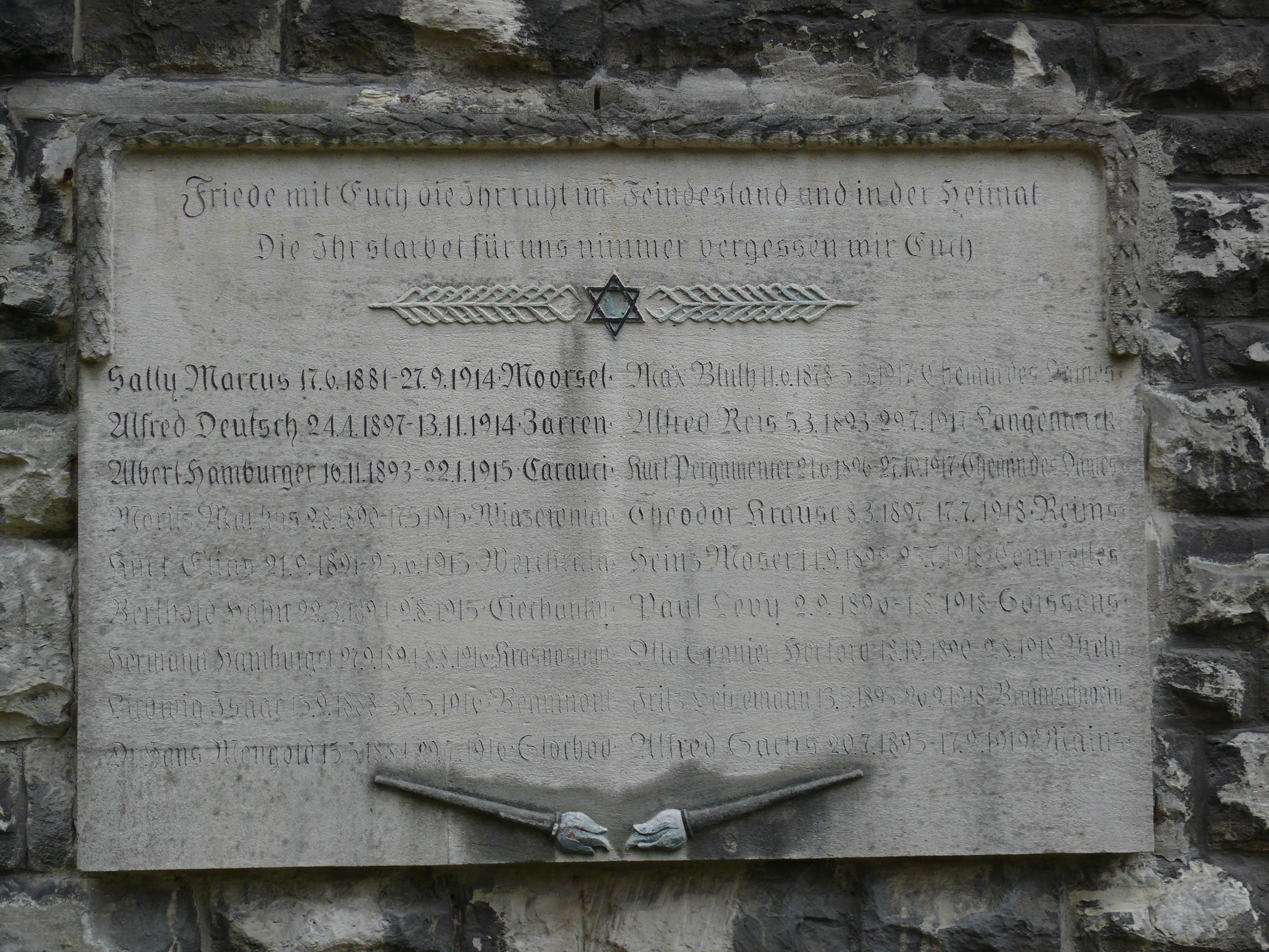 Gedenktafel Philipp Erlangers für die im Ersten Weltkrieg gefallenen Braunschweiger Juden auf dem dortigen Jüdischen Friedhof am Hauptfriedhof.